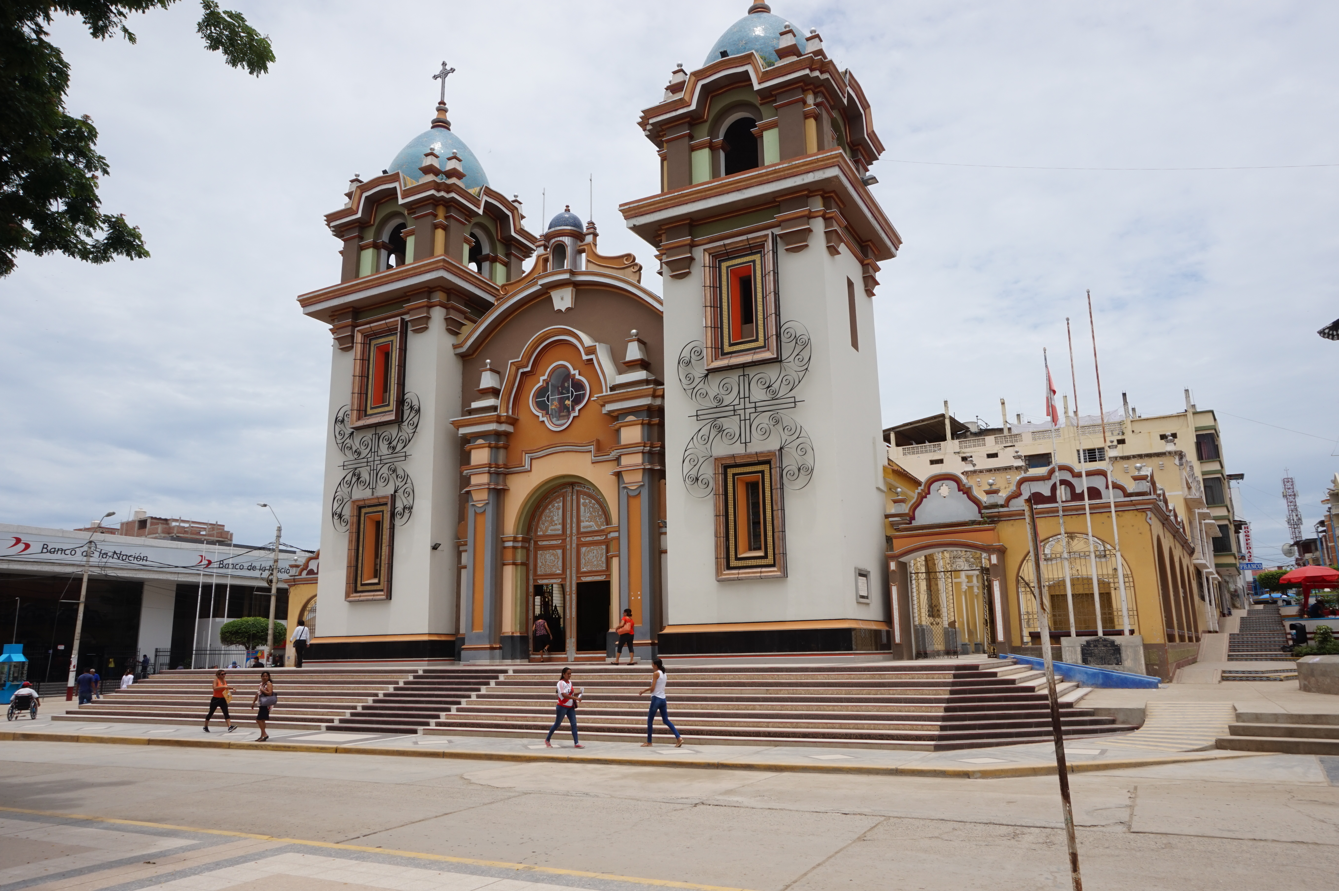 Iglesia de Tumbes Foto febrero 2019 Autos : pepe carmona silva